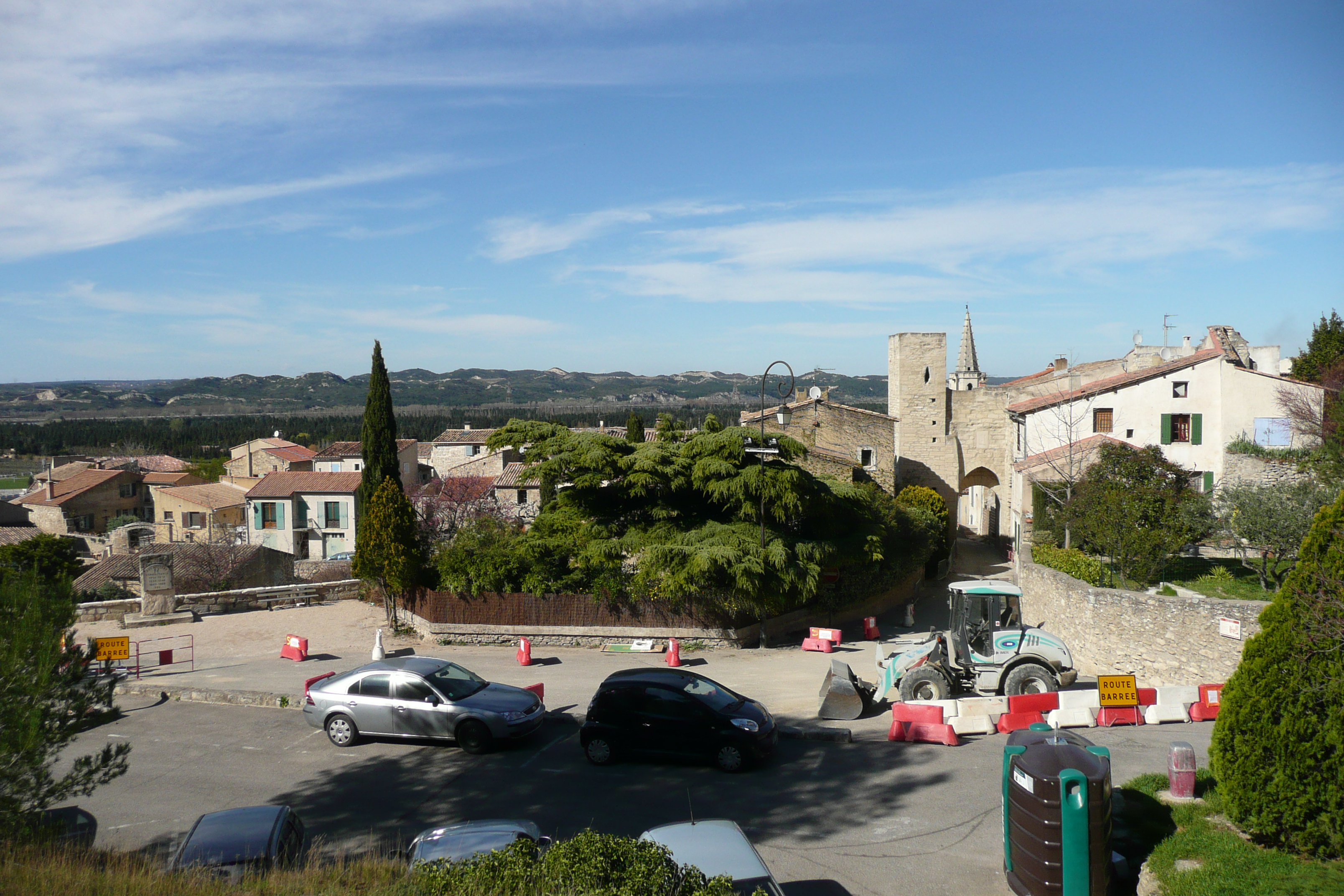 En face l'église et la porte du Séquier à Barbentane.